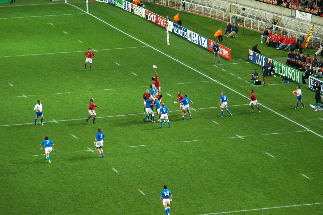 Match Italie contre le Portugal - Coupe du Monde de Rugby 2007